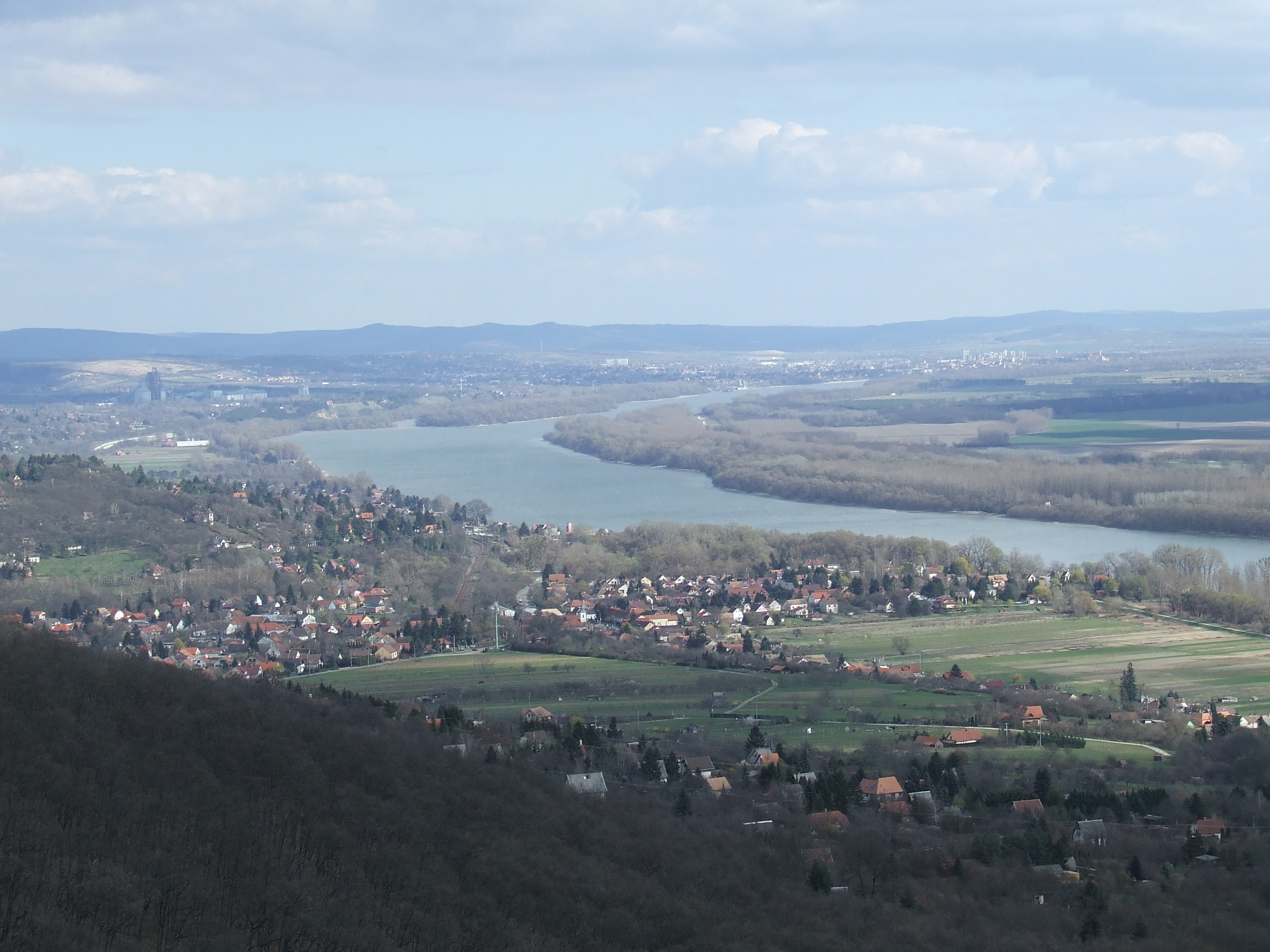 Dunakanyar Kismarosról